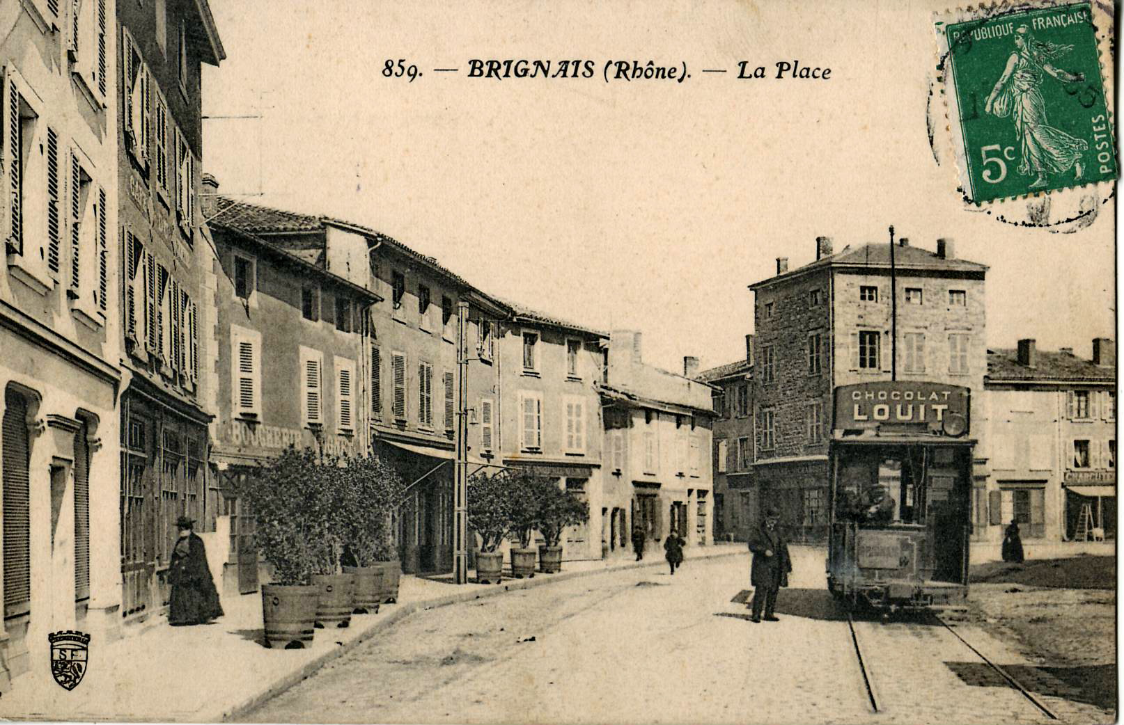 Carte postale ancienne éditée par SF, n°859 : BRIGNAIS - La Place